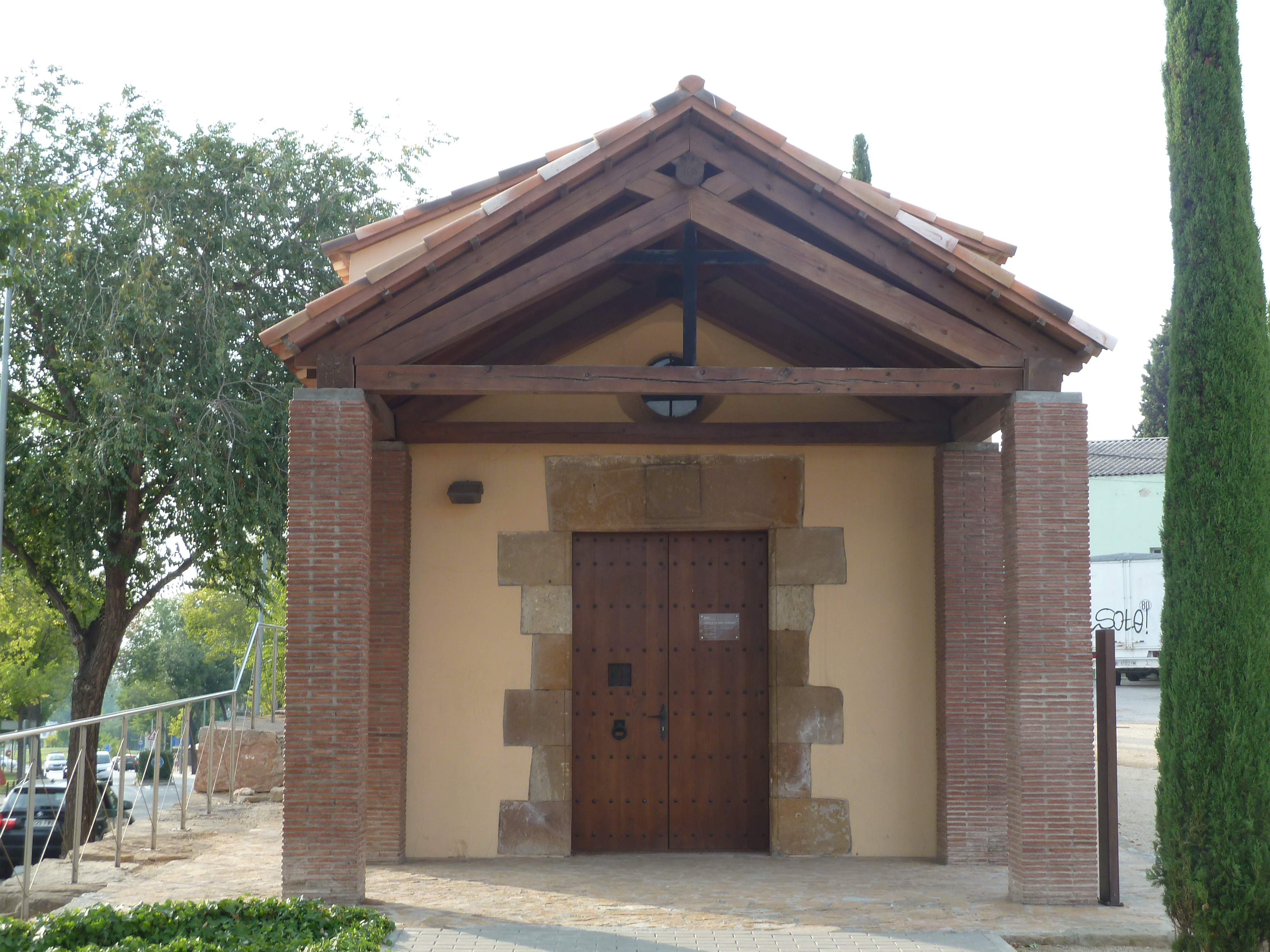 Sant Cugat del Vallès